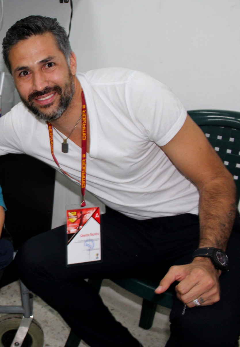 Mario Yepes exjugador canterano y actual técnico del Deportivo Cali